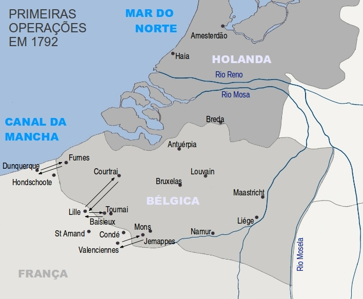 Mapa indicativo dos movimentos relativos às operações militares iniciais da Guerra da Primeira Coligação